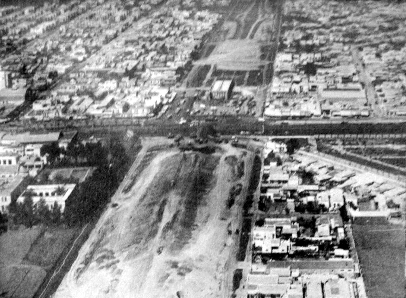 Vista a vuelo de pájaro en dirección norte-sur de las obras de construcción del camino de circunvalación de Buenos Aires, la Avenida General Paz, a fines de 1938. Al momento de la construcción de la Avenida, la mayor parte de las zonas que atravesaba aún no estaban urbanizadas. Una excepción era el barrio de Liniers, que aparece en esta fotografía. En el centro, en dirección horizontal, se ven las vías del Ferrocarril del Oeste (hoy Sarmiento), junto a la Avenida Rivadavia. El triángulo de la derecha corresponde al Cementerio Israelita de Liniers. Más allá, el puente sobre la calle Ramón Falcón.